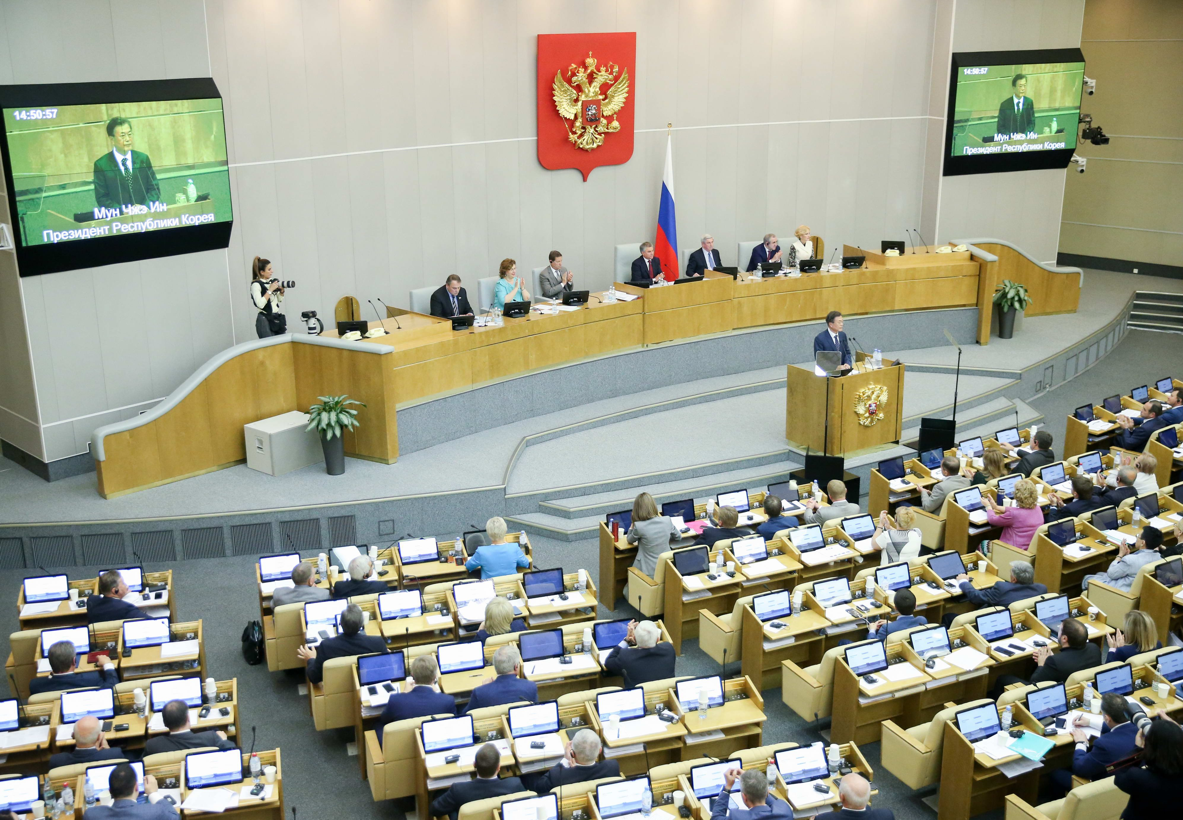 Moon Jae-in in the Russian State Duma (2018-06-21)